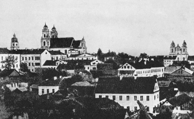 Беларуская (тарашкевіца): Менск (Miensk), вуліца Няміга (vulica Niamiha). Панарама Высокага Рынку з боку Ракаўскага прадмесьця.